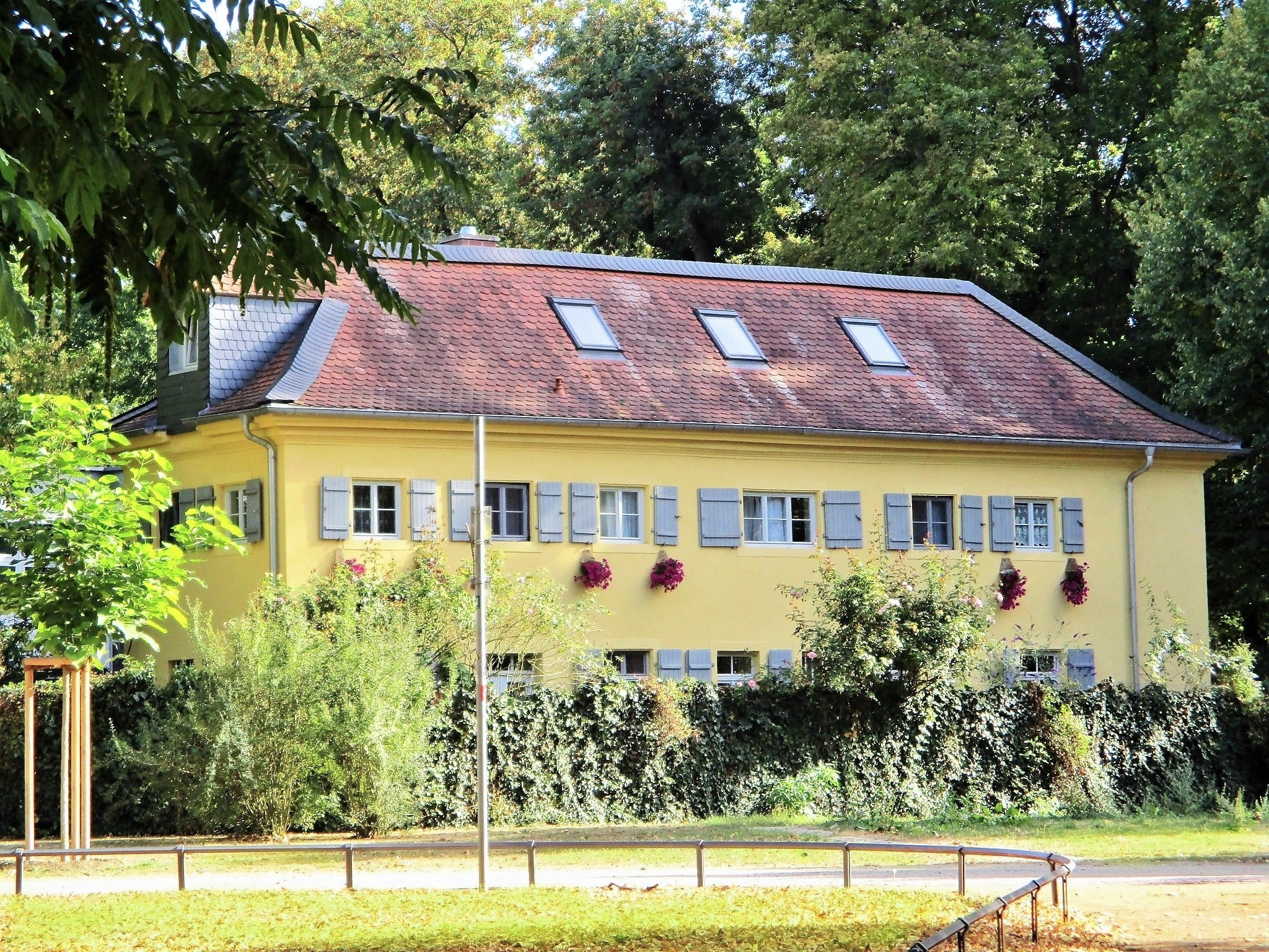 Das ehemalige Küchenhauses des Landhauses der Brentanos im Brentanopark Frankfurt am Main.